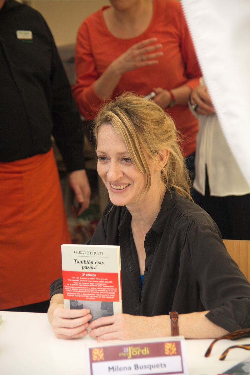 Signatura de llibres en la Diada de Sant Jordi-2015 a Barcelona